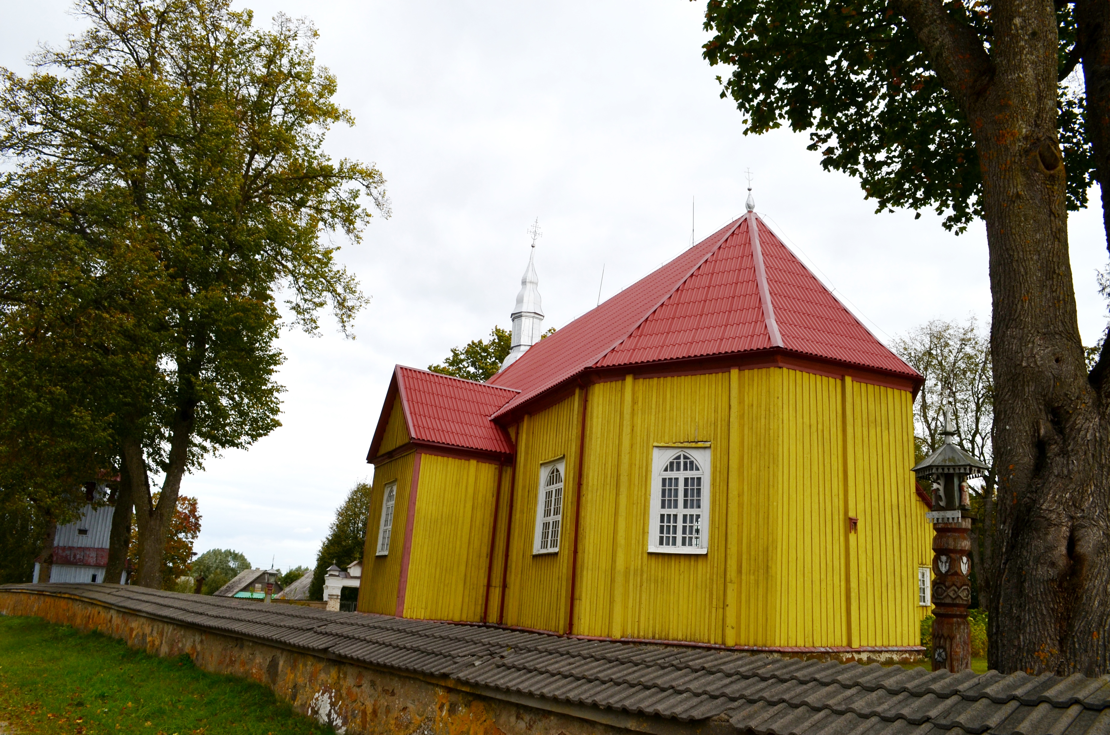 Karklėnų bažnyčia, Kelmės raj.